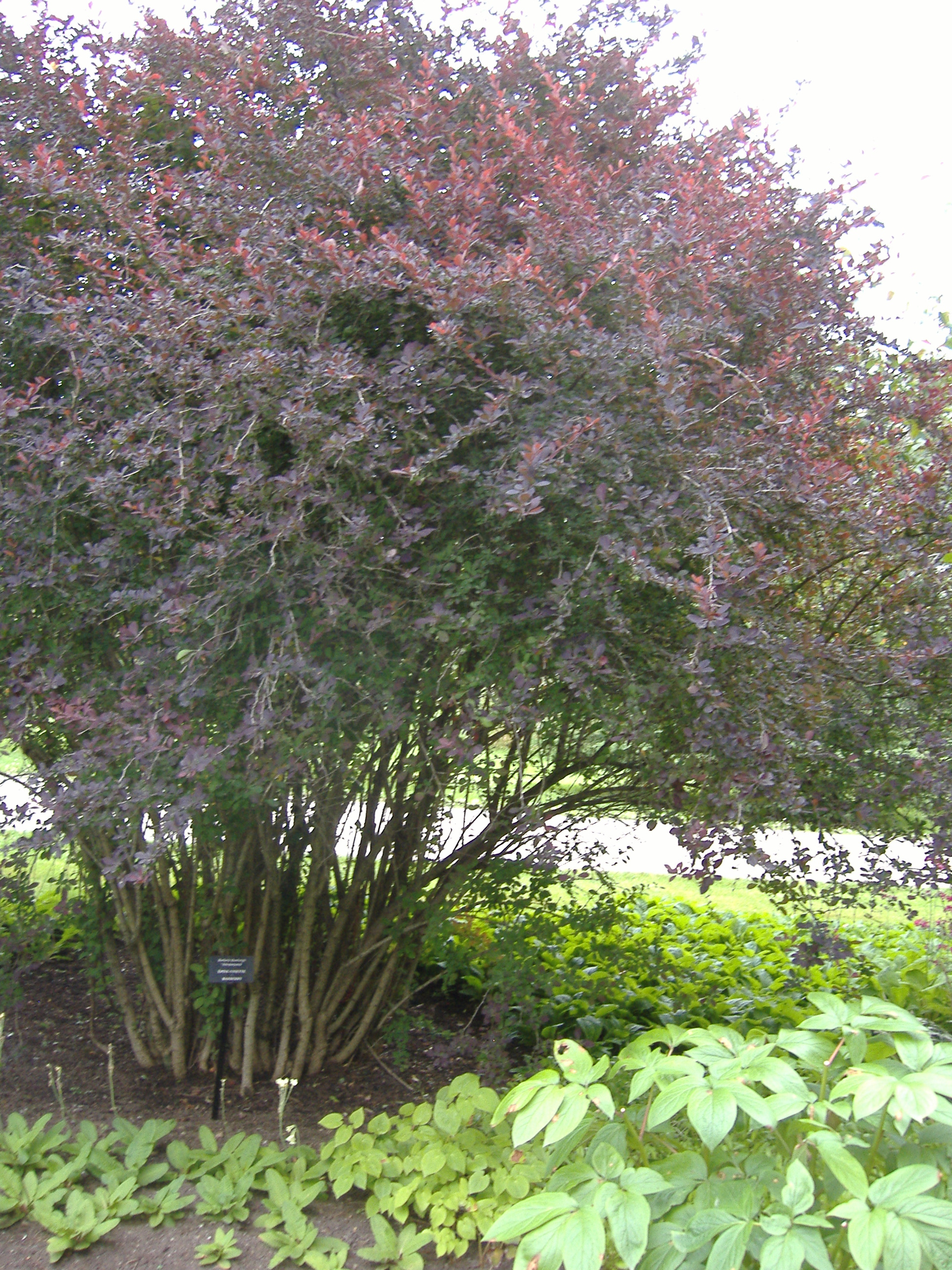 Berberis aux Jardins de Métis